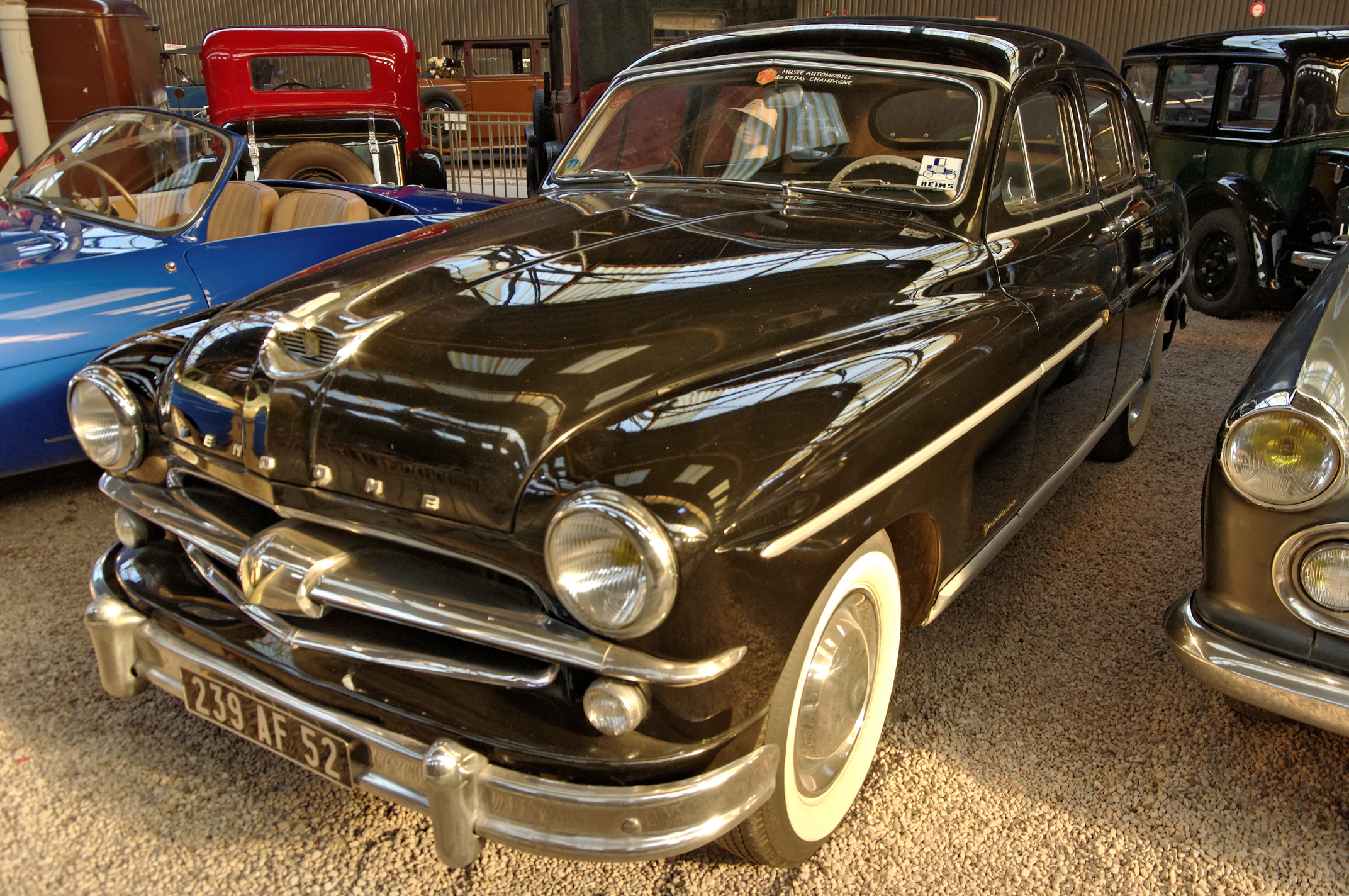 Ford SAF Vendôme (1954), Limousine 6 places, 8 cyl. en V à soupapes latérales, 3923 cm3, 93 ch., vitesse max. 148 km/h(Musée Automobile Reims Champagne, Reims, Marne, France)